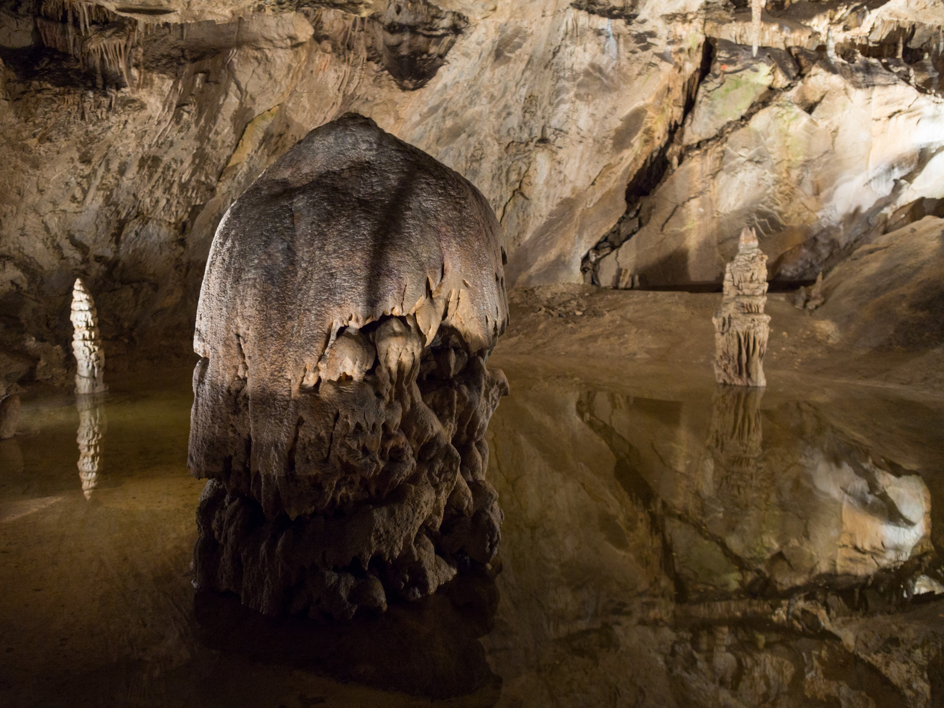 Stalagmity w Sali Palmowej w Jaskini BielskiejSlovenčina: Stalagmity v Palmovej sieni v Belianskej jaskyni